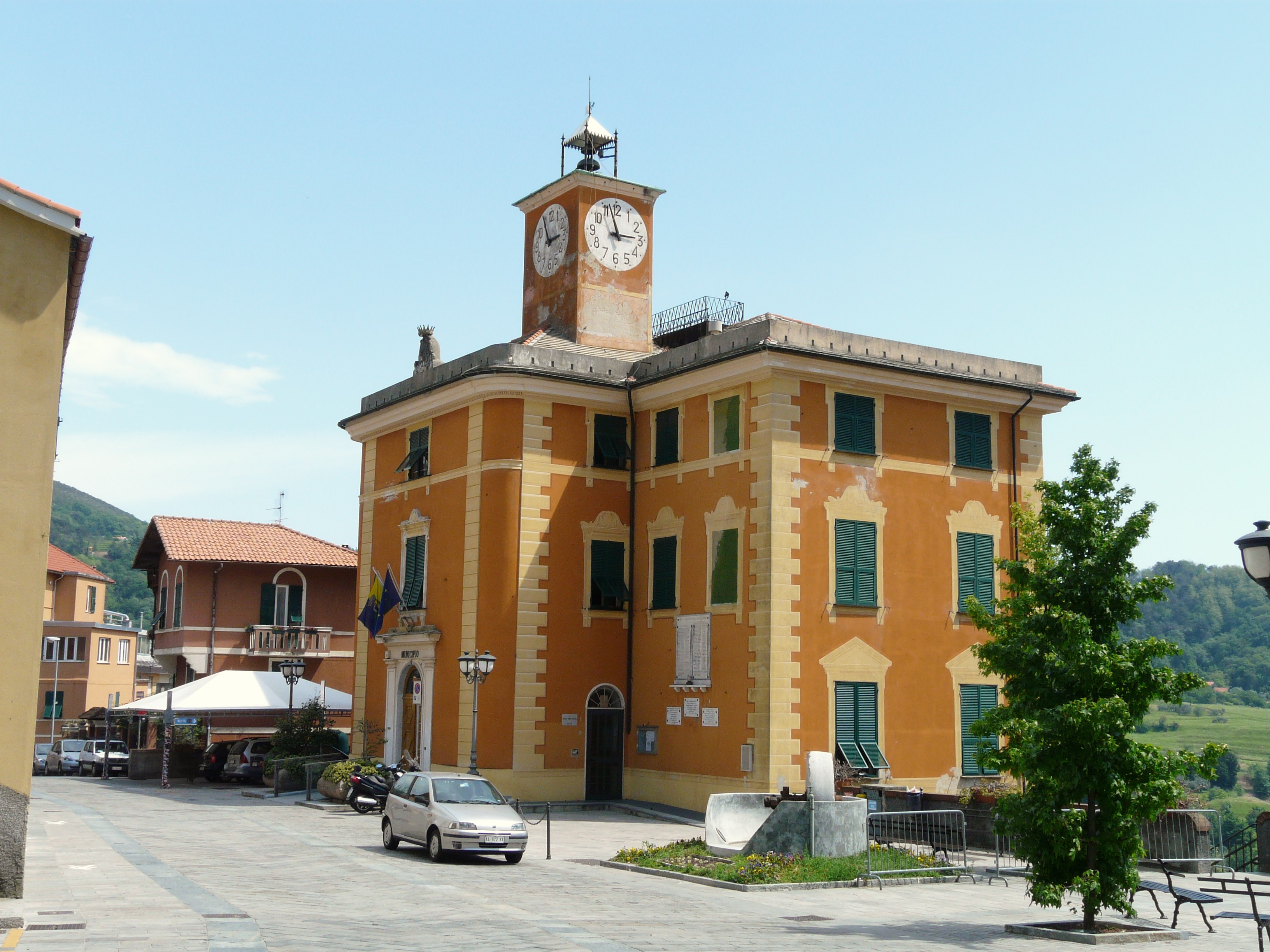 Municipio di Mele, Liguria, Italia